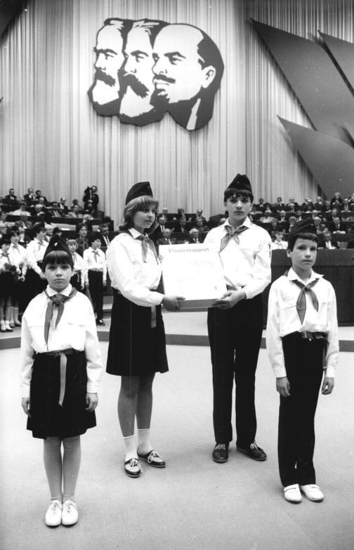 ADN-ZB-Mittelstädt-28.4.86-pst-Berlin: XI. Parteitag der SED- Höhepunkt des Pioniergrußes an den Parteitag war die Übergabe einer Kassette mit den Ergebnissen der "Pionierexpedition - Rote Fahne" an Erich Honecker. 5 633 der aktivsten Pioniere hatten sich mit ihren Leistungen das Recht erworben, diesen Rechenschaftsbericht persönlich zu unterschreiben."